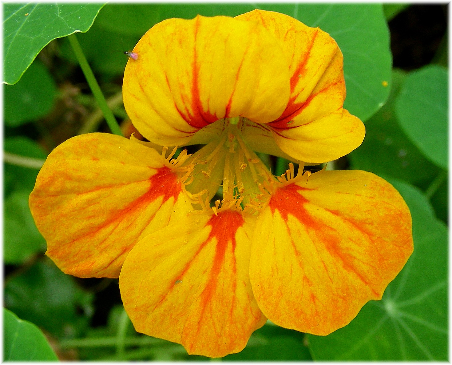 Galicia (Spain) - Flor